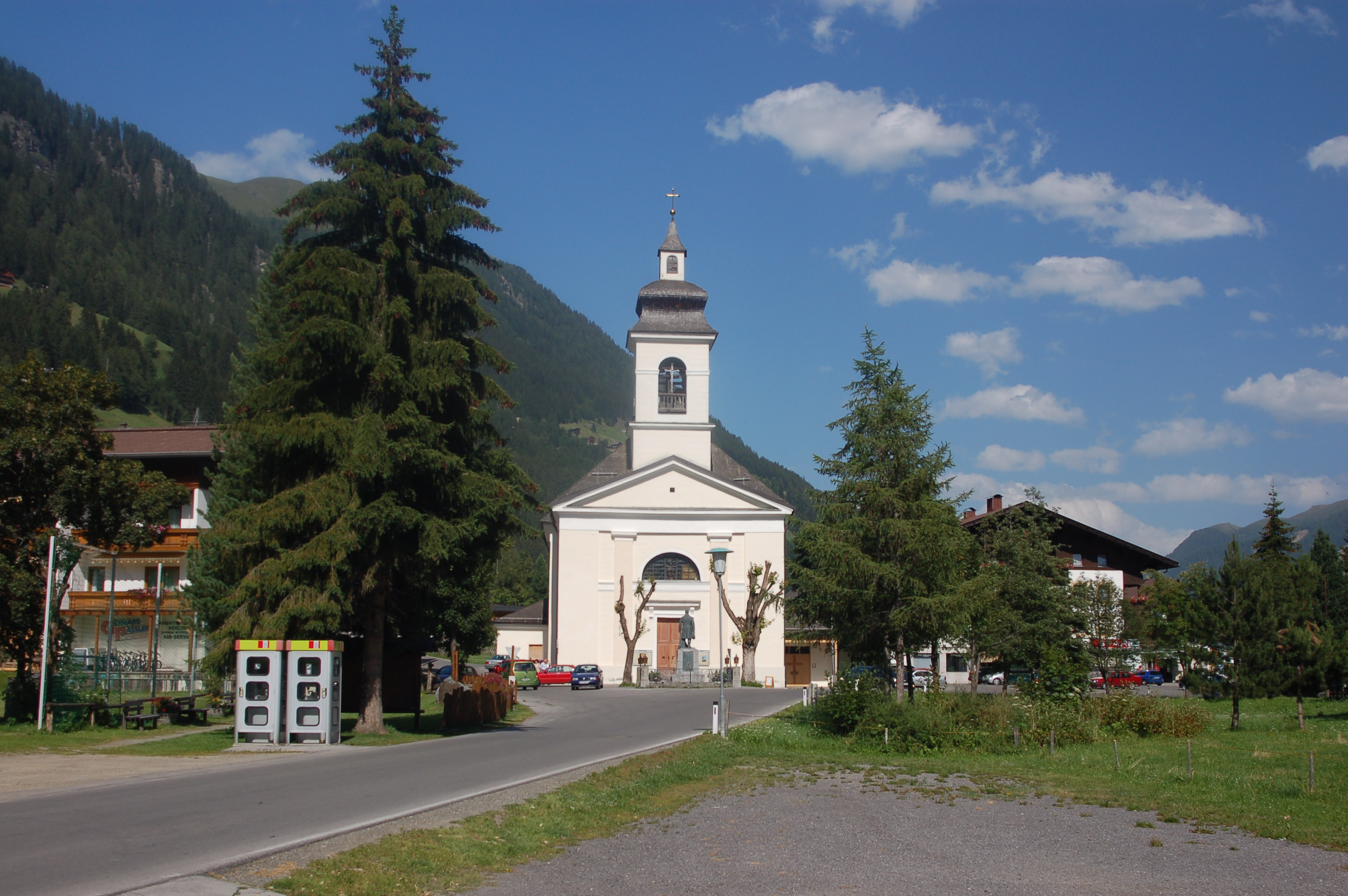 Pfarrkirche in Sankt Jakob in Defereggen